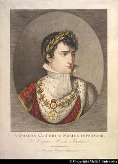 Fait partie de La Collection Napoléon de l'Université McGill.